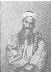 Mírzá Yaḥyá Núrí (1831-1912), demi-frère de Bahá'u'lláh (1817-1892), successeur du Báb et chef des Babis Azalis sous le titre de Ṣubḥ-i-Azal (Aurore de l'Eternité)